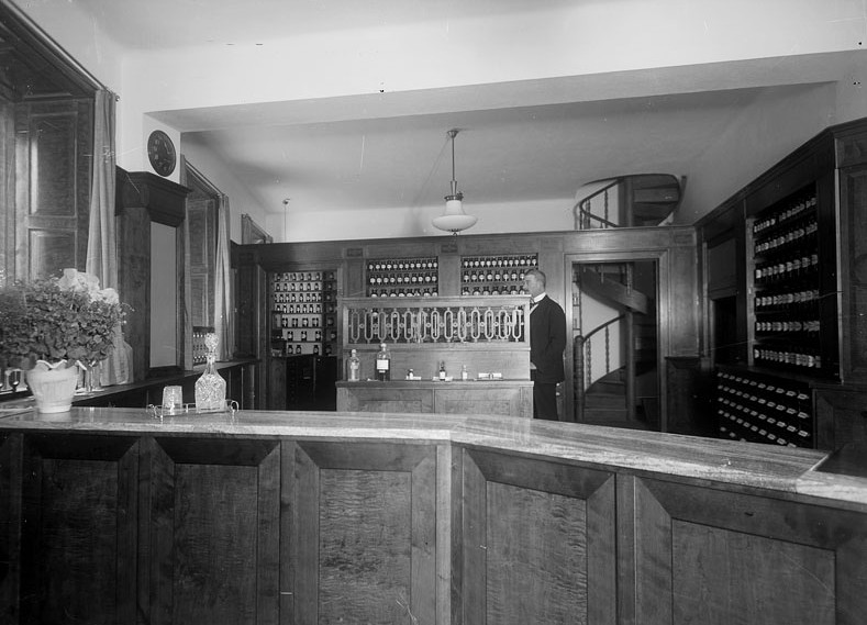 Apoteket Korpen låg mellan 1924 och 1948 vid Västerlånggatan 6